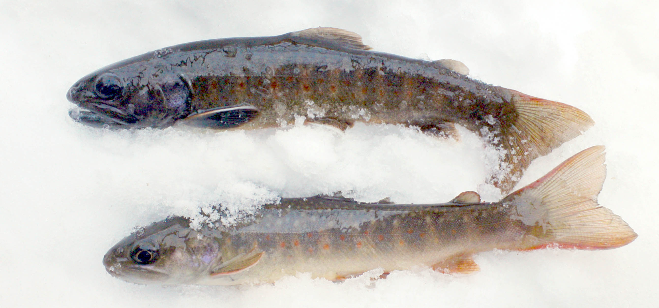 Salvelinus leucomaenis japonicus.